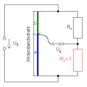 Wheatstone’sche Brückenschaltung (Schleifdraht_Messbrücke)